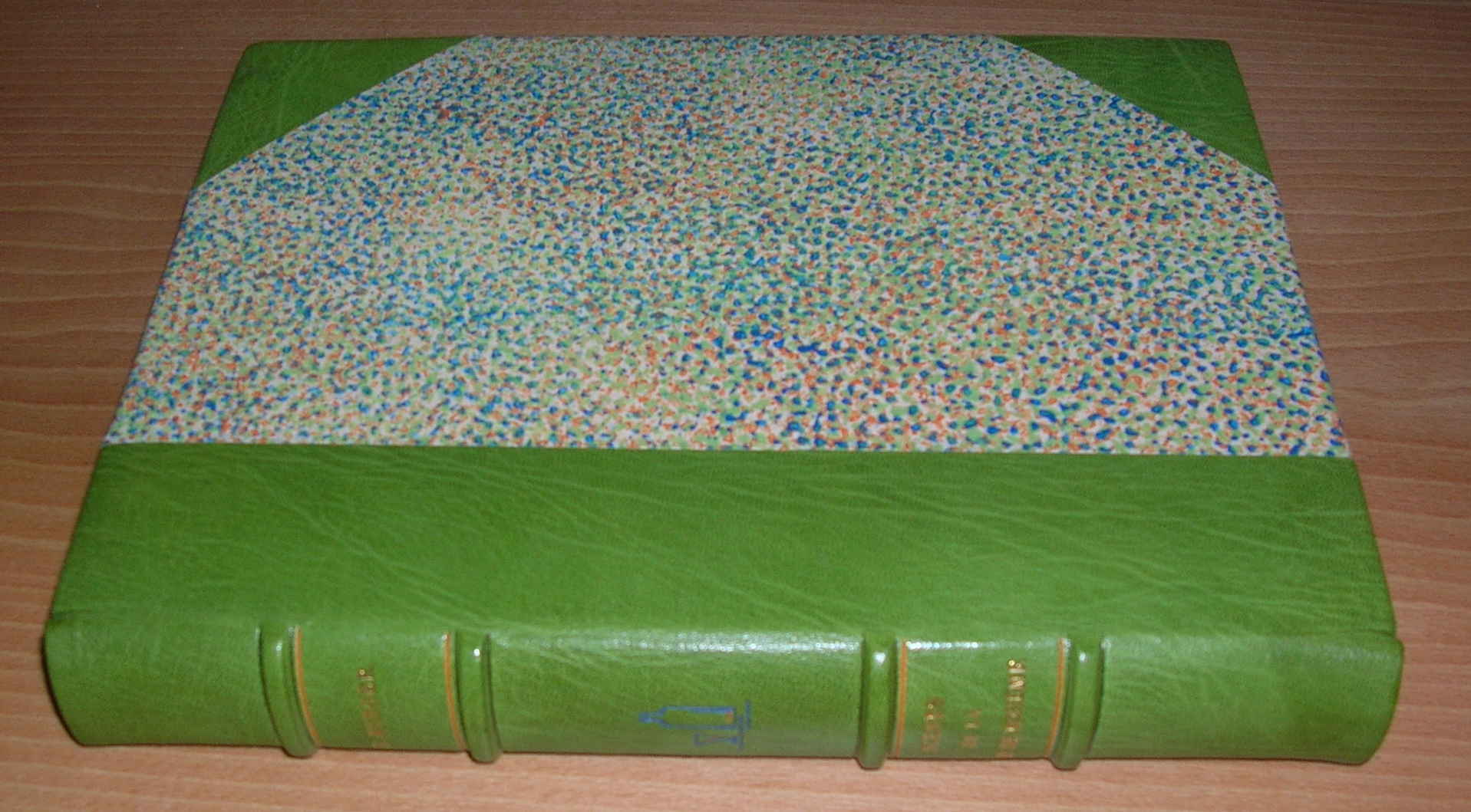 Reliure d'un demi chagrin à nerf et à coin